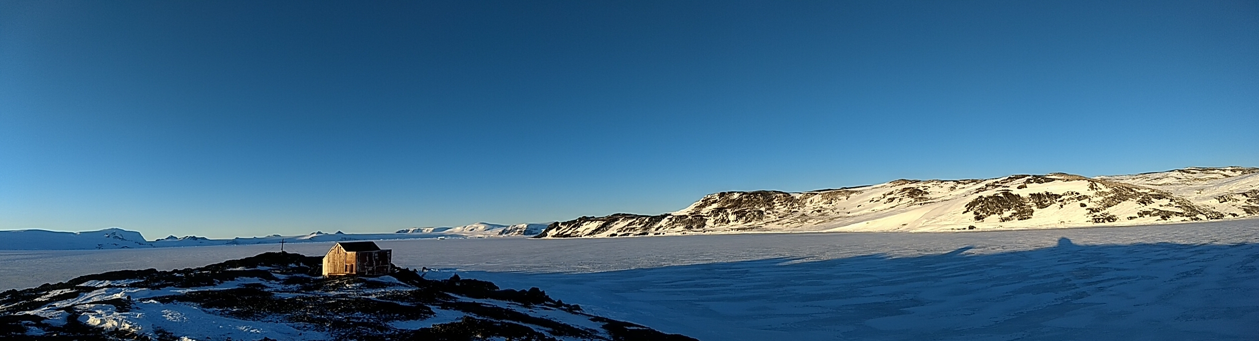 VISTA PANORAMICA DONDE SE PUEDE APRECIAR EL REF BONNEN RIVERA , Y DE FONDO LA BAHIA DUSE COMPLETAMENTE CONGELADA